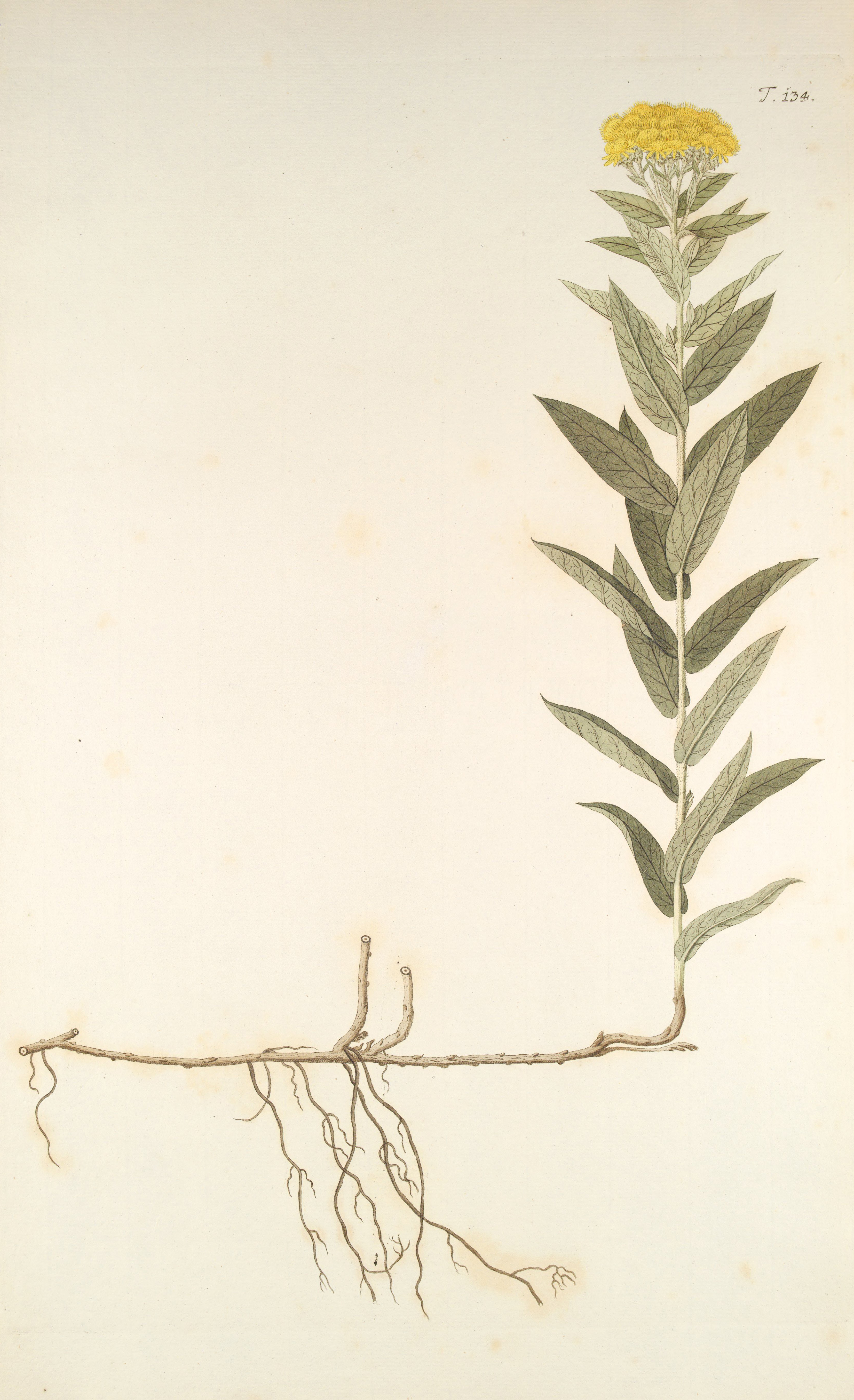 Legende: Ganze Pflanze.